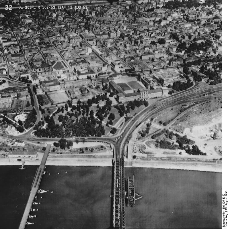 Rheinbefliegung der Alliierten 1953